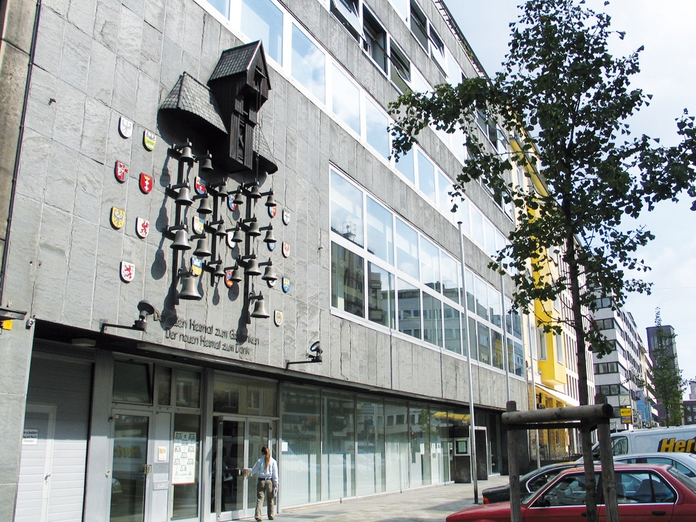 Straßenansicht des Gerhart-Hauptmann-Hauses, Bismarckstraße 90, Düsseldorf-Stadtmitte